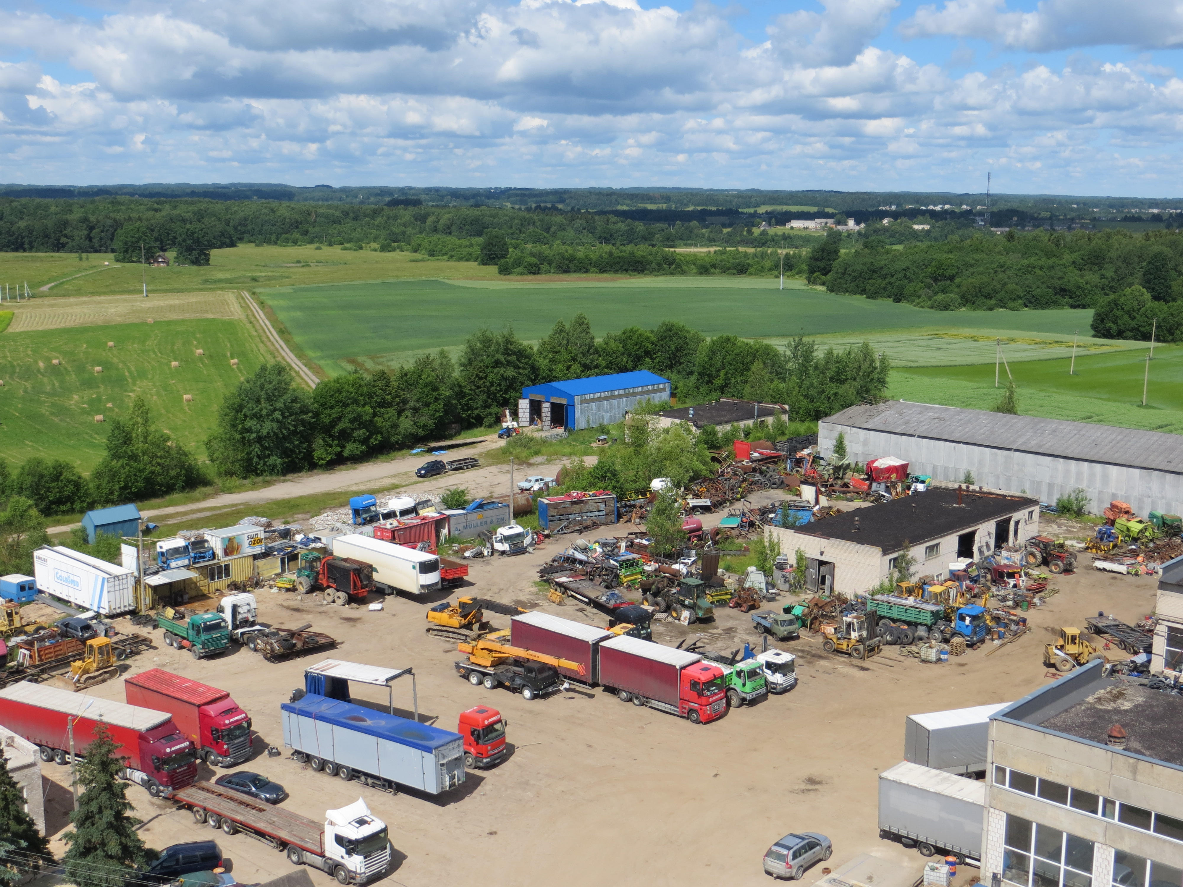 Utenos sen., Lithuania